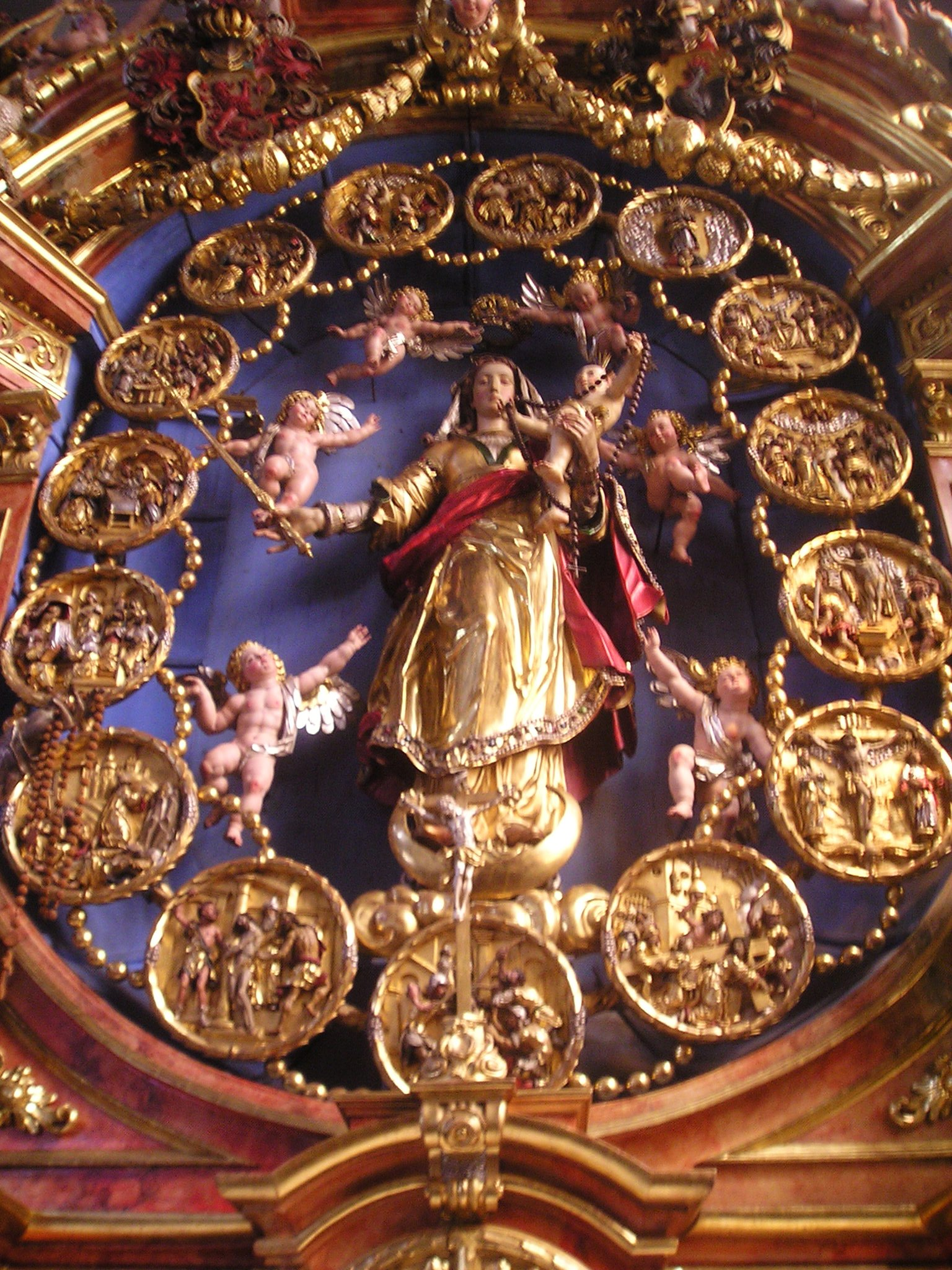 Rosenkranz-Altar, Überlinger Münster Photography: F. Bucher